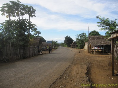 Ambondromifehy, Diana, sur la route nationale 6